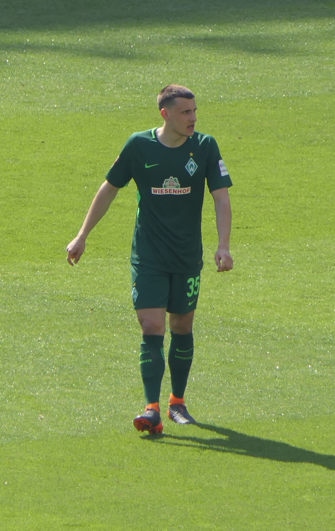 Der Fussballprofi Maximilian Eggestein im Trikot vom SV Werder Bremen beim Auswärtsspiel gegen den VfB Stuttgart am 21.04.2018.